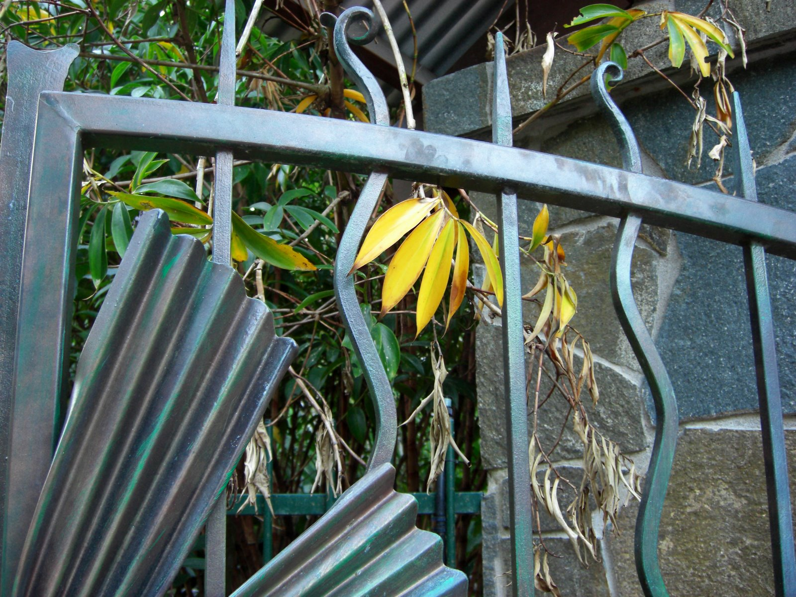 Grilles du jardin botanique de Cairns